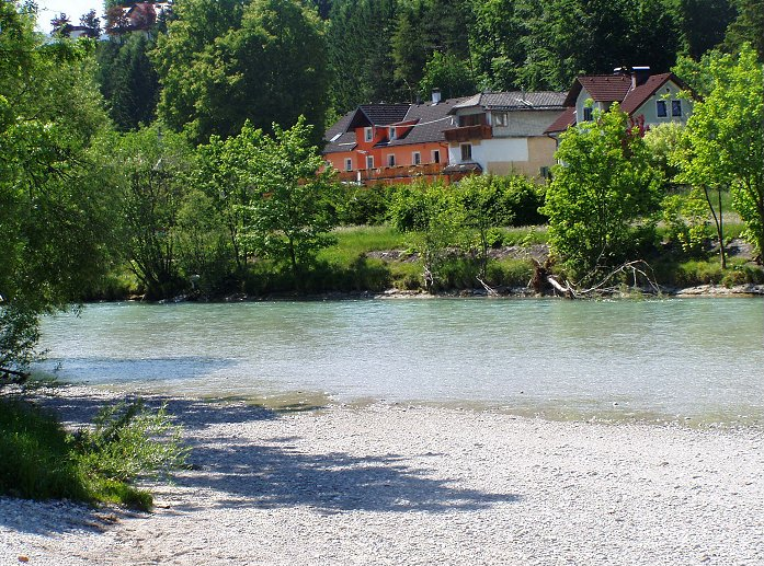 Die Alm in Scharnstein